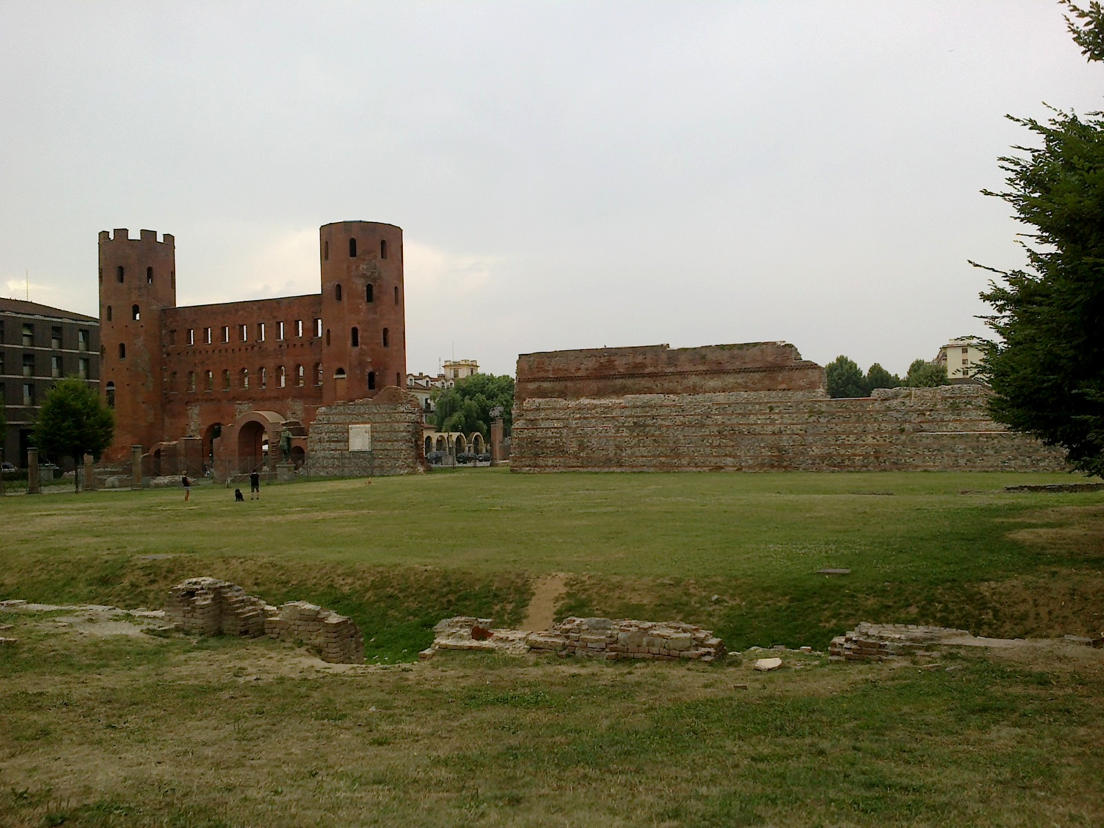 Turin Parc Archeologique